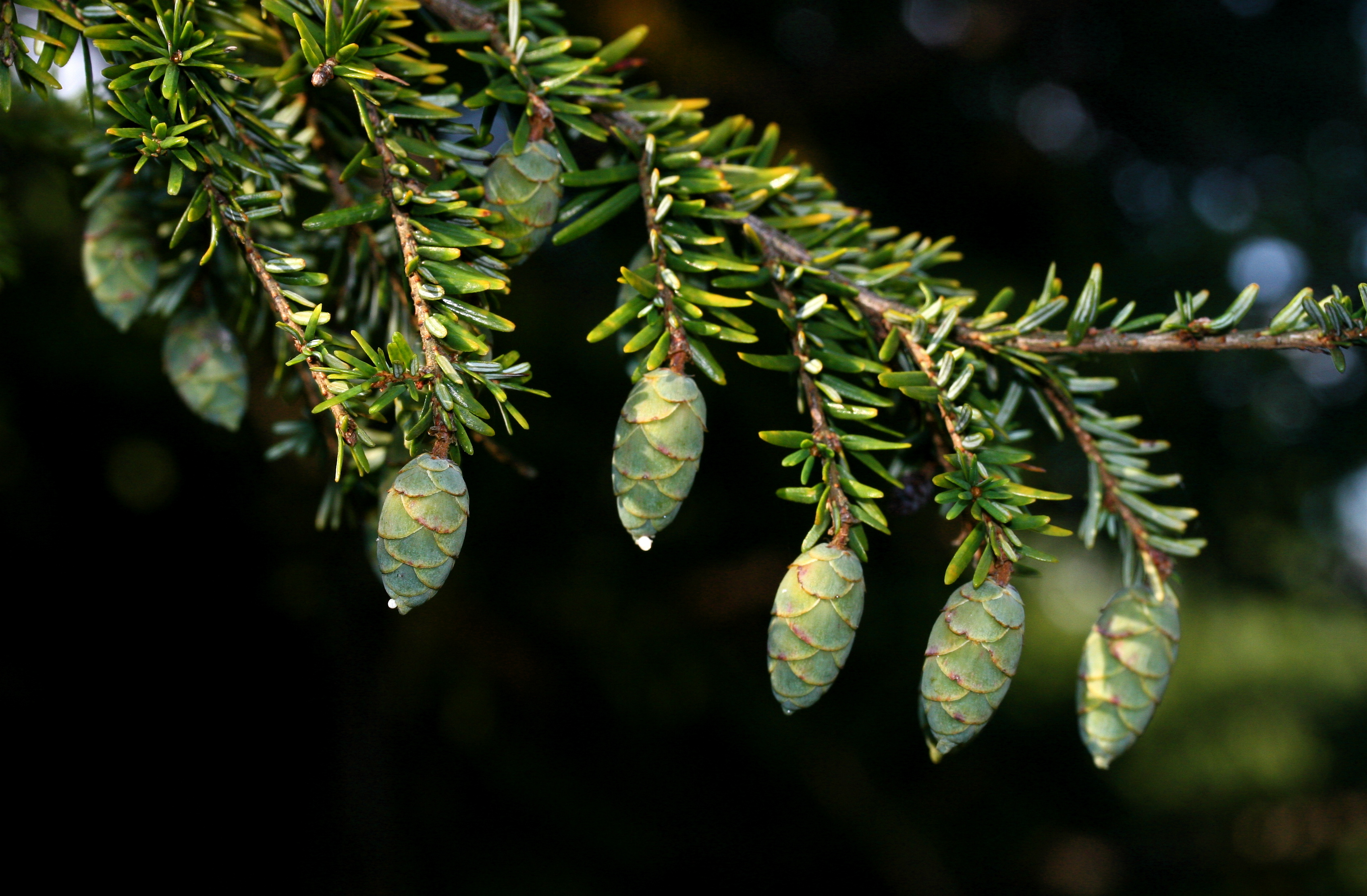 Tsuga canadensis immature cones.